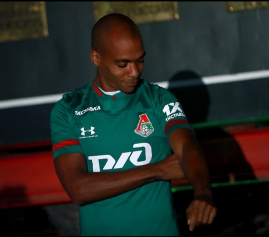 João Mario al Lokomotiv Mosca nel 2019